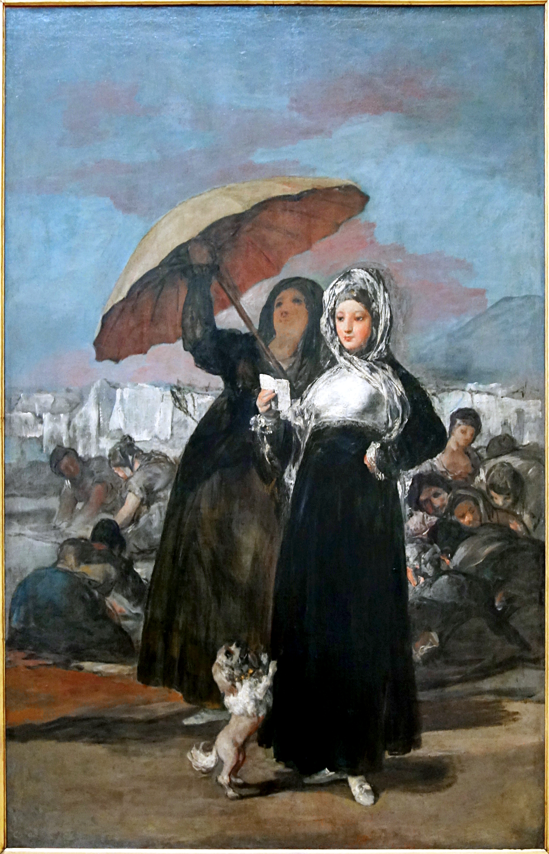 Les jeunes, au Palais des beaux-arts de Lille.